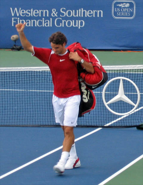 2005 Cinncinatti US Open Series